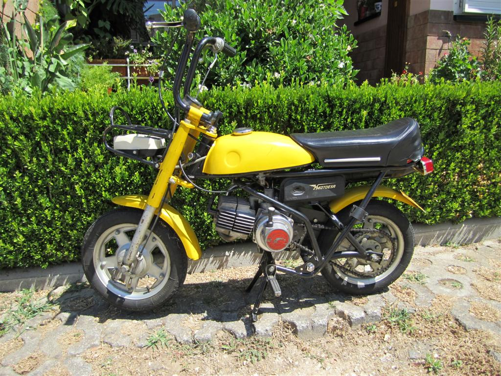 EFS Mini Puch 1984